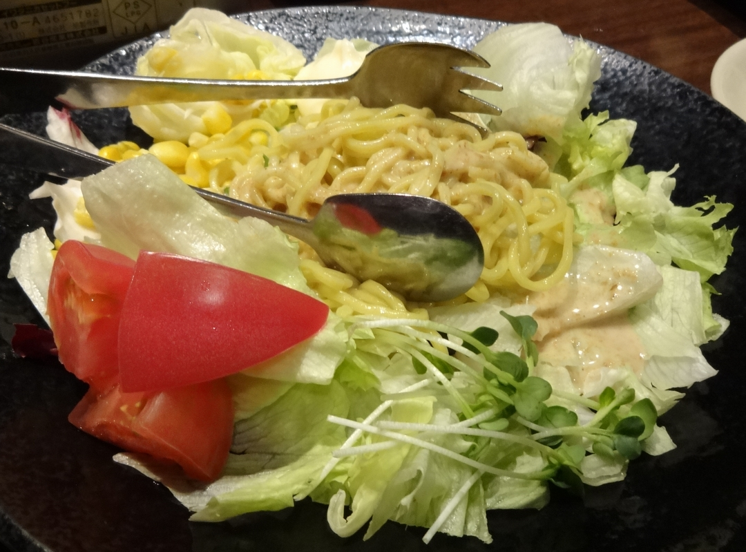 Ramen Salad (ラーメンサラダ)